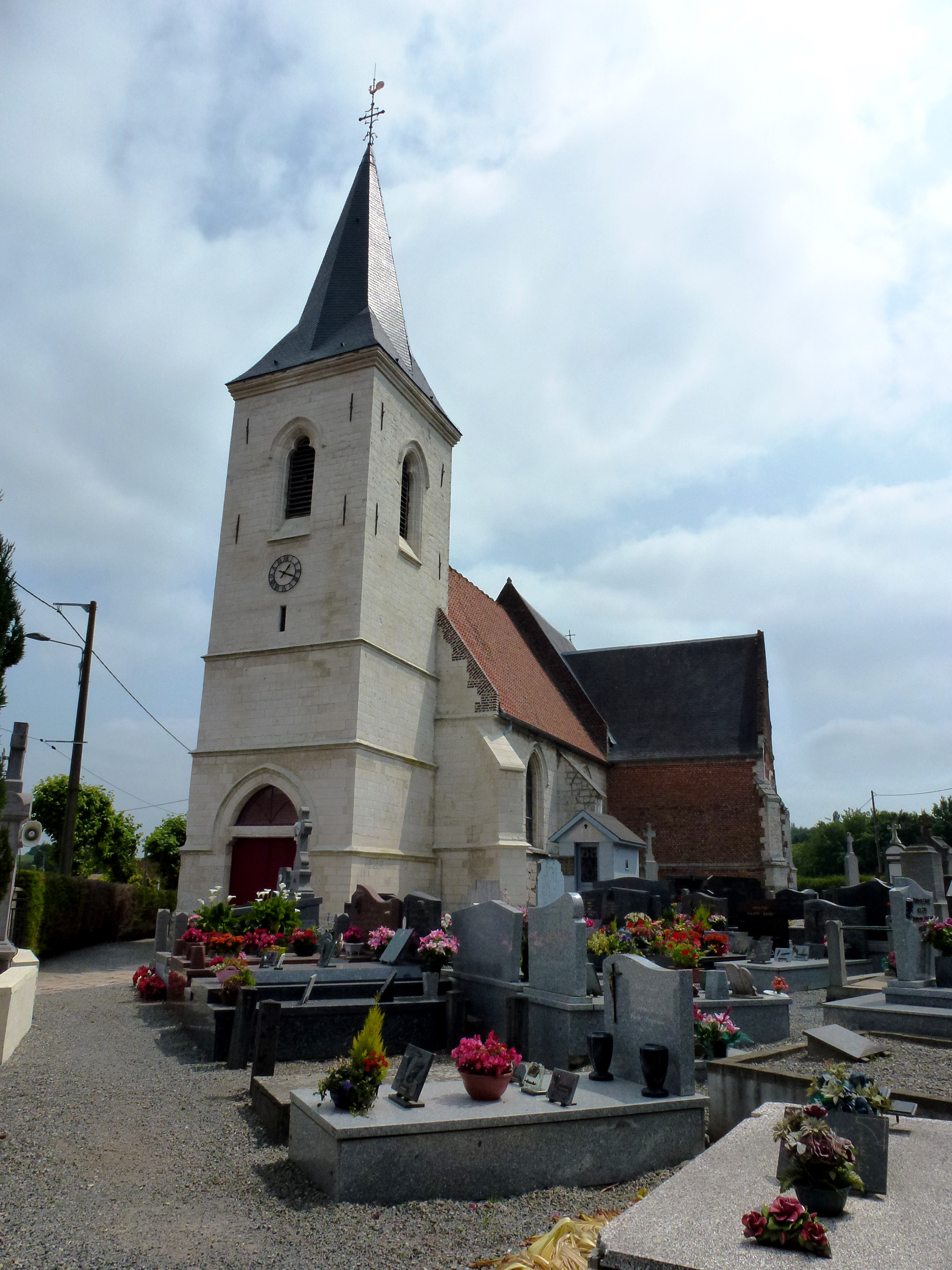 Bailleul-lès-Pernes (Pas-de-Calais, Fr) église PA00108188 .